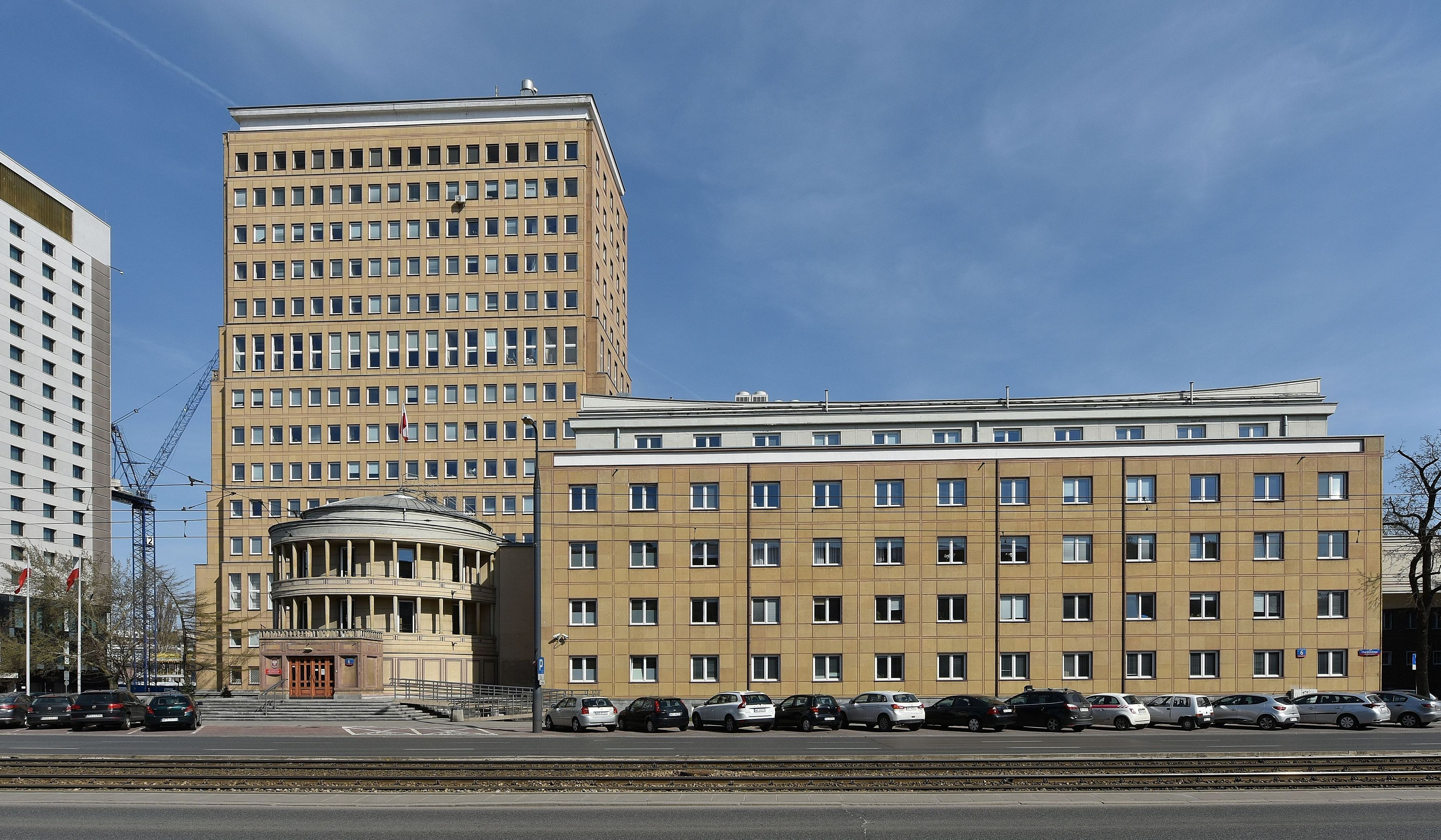 Budynek Ministerstwa Infrastruktury przy ul. Chałubińskiego 4/6 w Warszawie